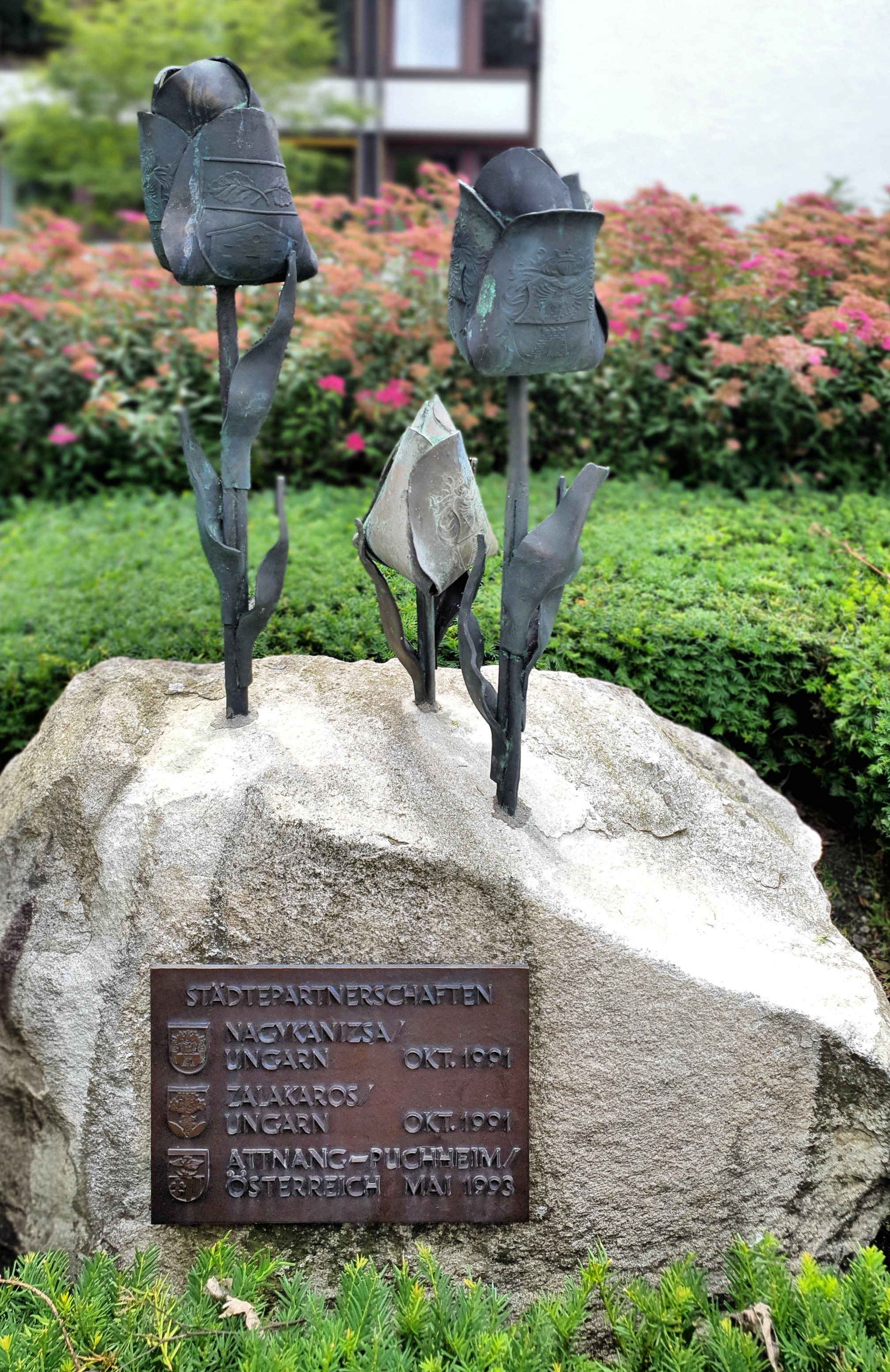 Deutschland, Bayern, Oberbayern, Landkreis Fürstenfeldbruck, Gedenkstein für die Städtepartnerschaften der Stadt Puchheim, nach 1993 errichtet